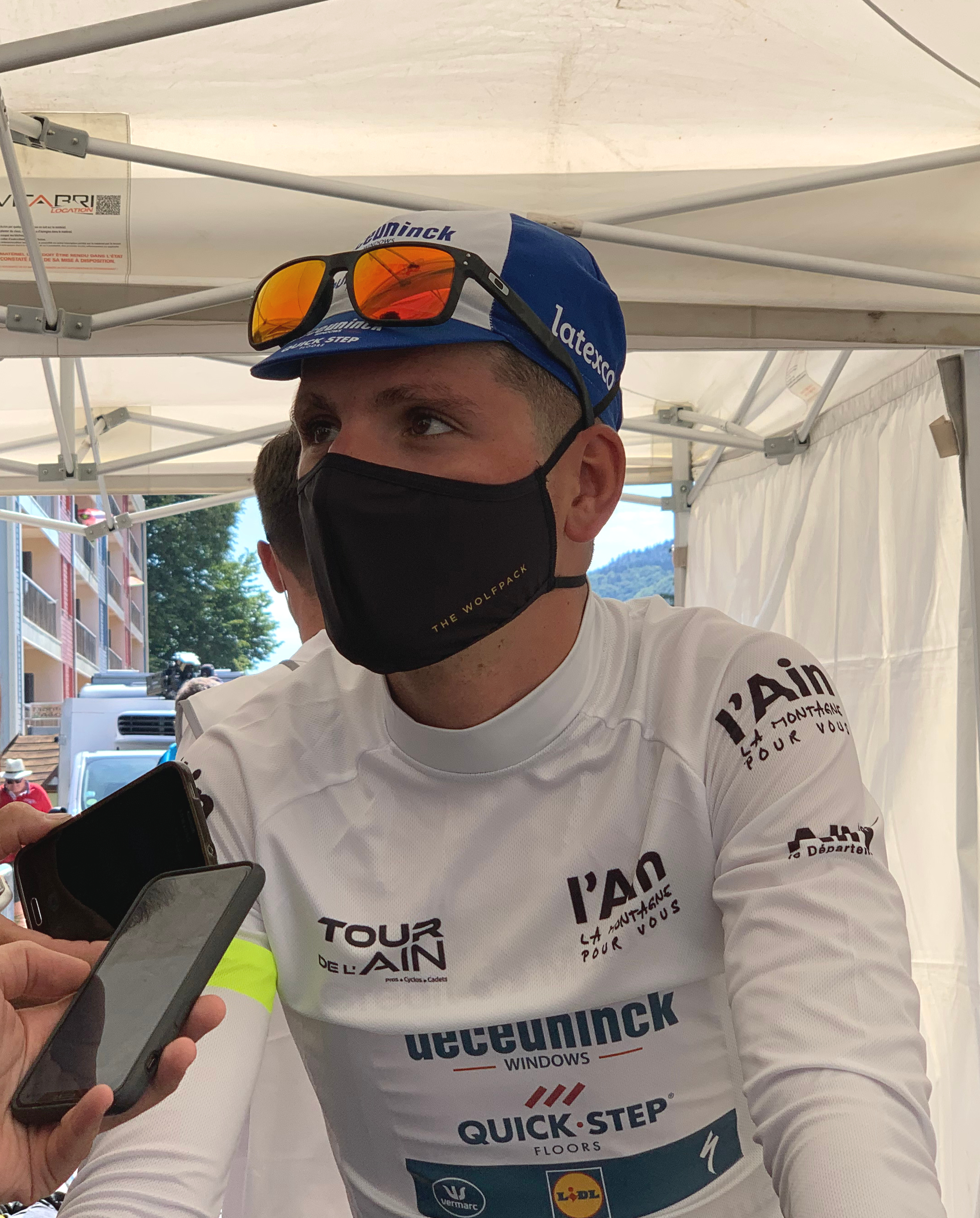 Deuxième étape du Tour de l'Ain 2020 - João Almeida, maillot blanc.